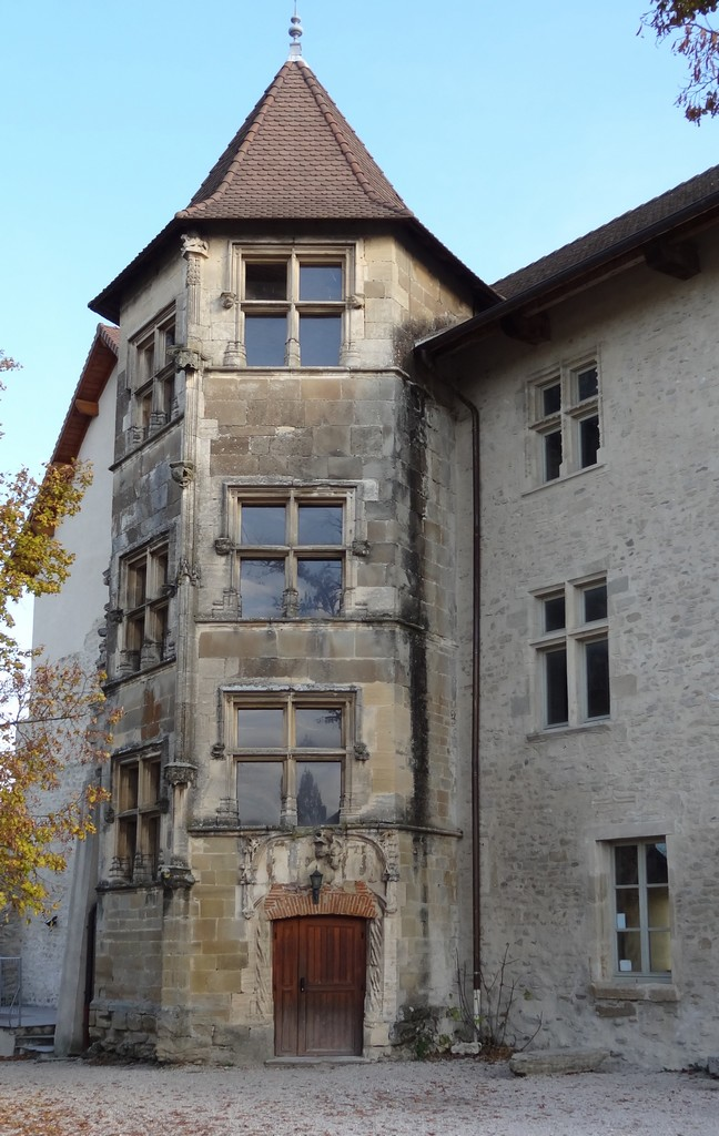 Vue depuis la cour intérieure côté sud-ouest montrant la tourelle polygonale du XVème siècle abritant un escalier à vis reliant les différentes parties du bâtiment et les différents étages.